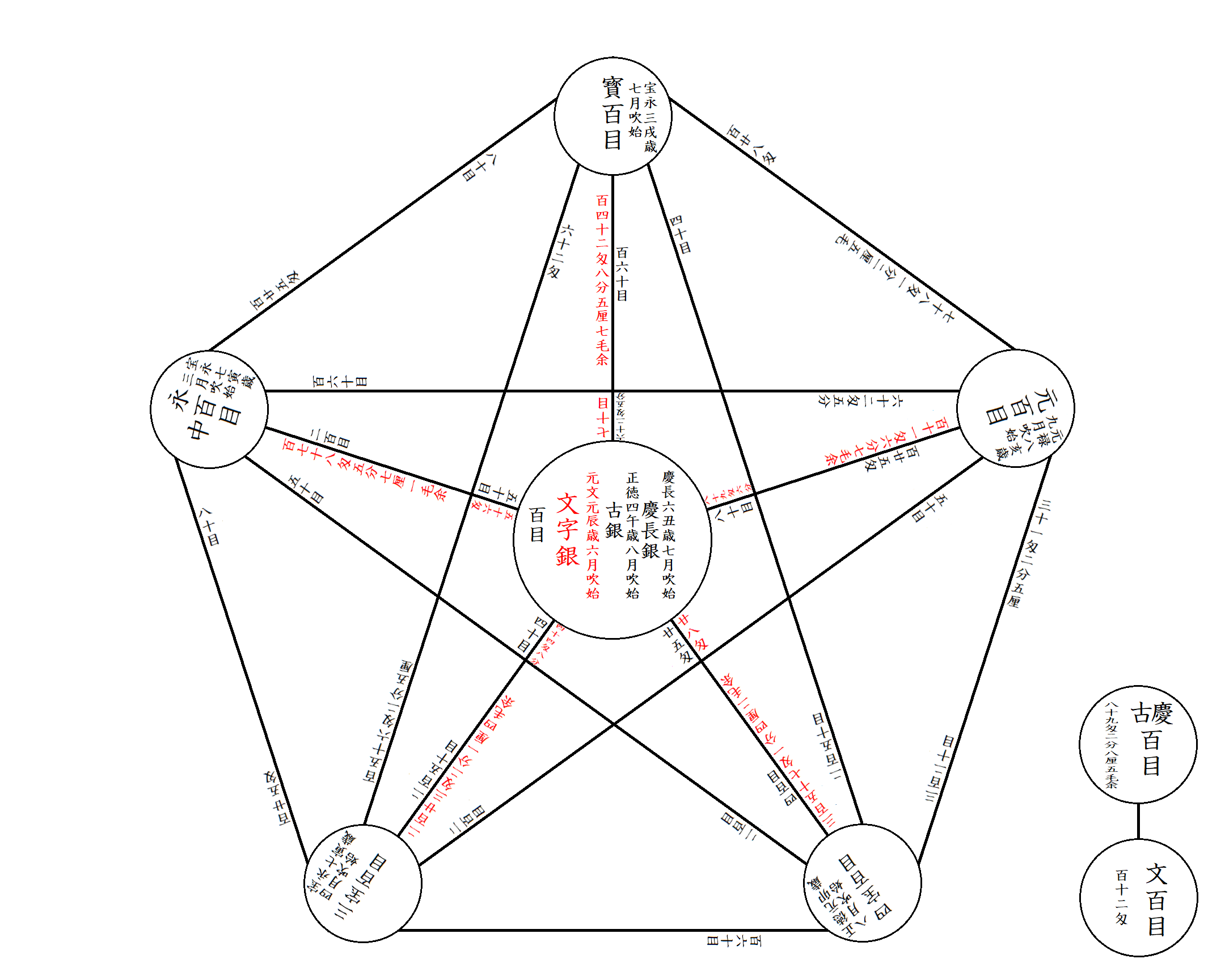 1736年刊行 六品銀交易一覧 銀品位の異なる丁銀6算種間の交換比率の計算早見表。新稿 両替年代記関鍵 巻二考証篇を元に作成。